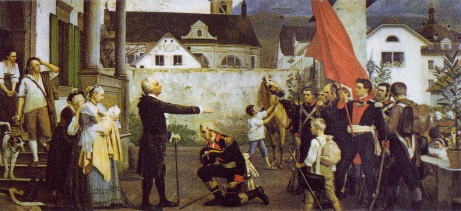 Historiengemälde des 19. Jahrhunderts: Landeshauptmann Alois Reding nimmt im Frühjahr 1798 in Schwyz den Segen seines Vaters entgegen, bevor er als General der Innerschweizer Truppen gegen die Franzosen zieht. Der Blick des Vaters in Richtung Himmel symbolisiert das Gottvertrauen der Innerschweiz, die ihr Schicksal in Gottes Hand legt. Das Bild steht für den Wehrwillen und den Unabhängigkeitswillen der Innerschweiz. (Ausschnitt aus dem Orginalgemälde)